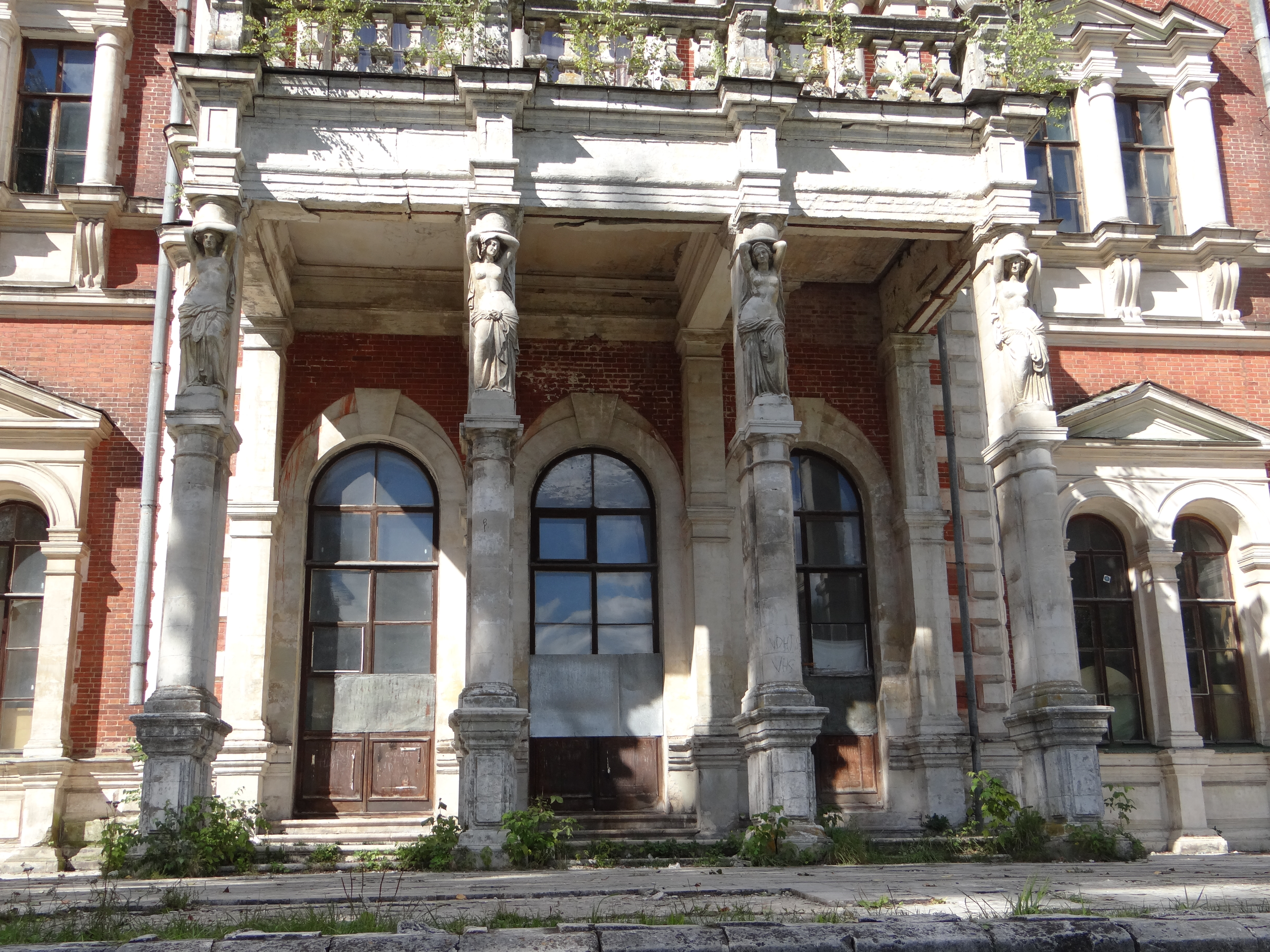 Усадьба М. М. Измайлова «Быково»: Быково (к югу от аэропорта), Раменский район, Московская область